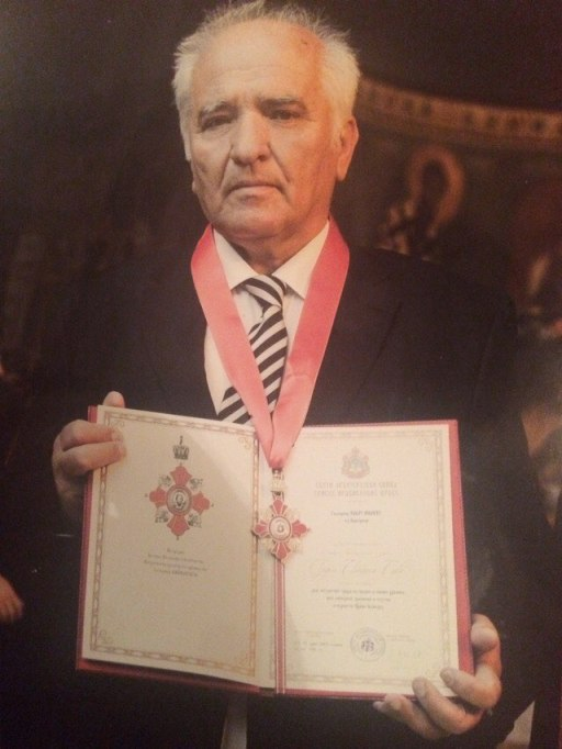 Павле Милић позира приликом додјеле Ордена Светог Саве